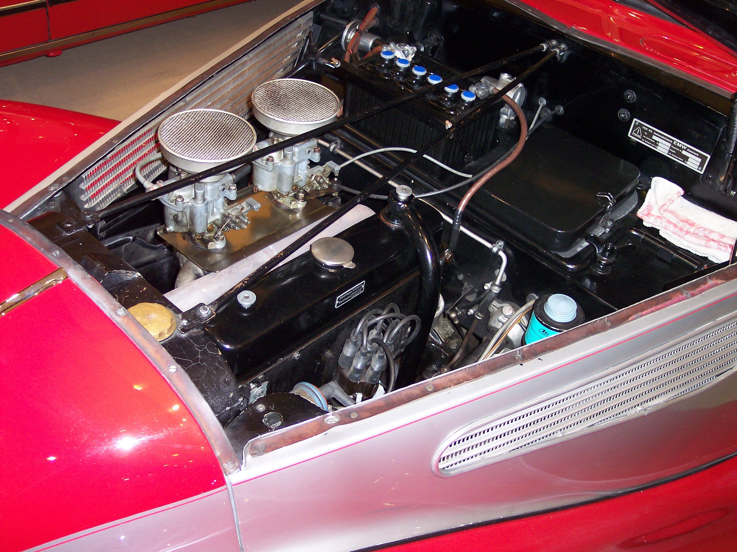 EMW 327 engine